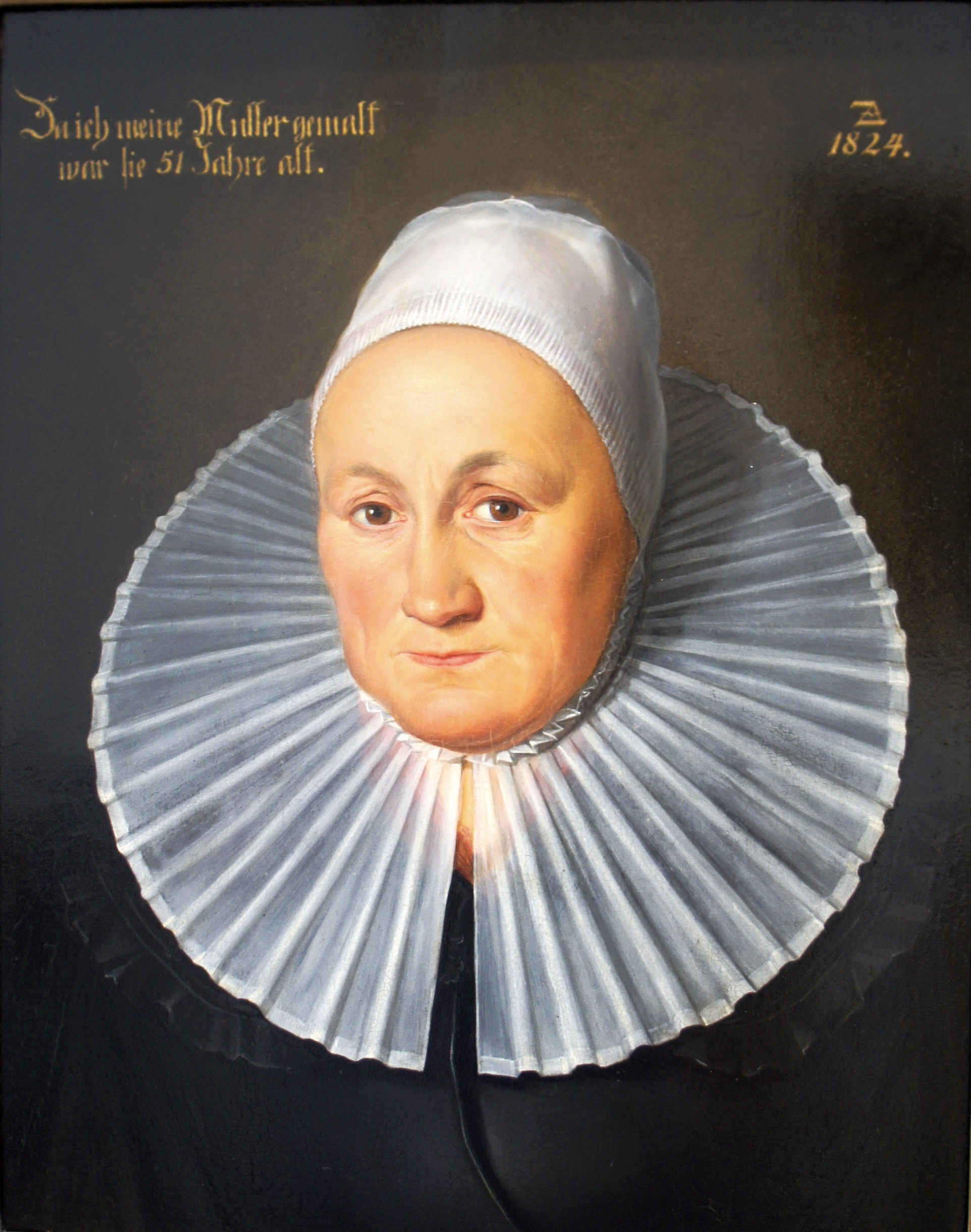 Die Mutter des Malers, Johanna Christina Zimmermann, geborene Geisler. Herrnhuter Witwentracht mit weißer Haube und gefälteltem Kragen. Oben rechts signiert: AZ 1824. Öl auf Holz, H 37 x B 29,5 cm. Gemälde im Kulturhistorischen Museum, Neißstraße 30 in Görlitz